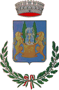 Stemma del Comune di Lioni